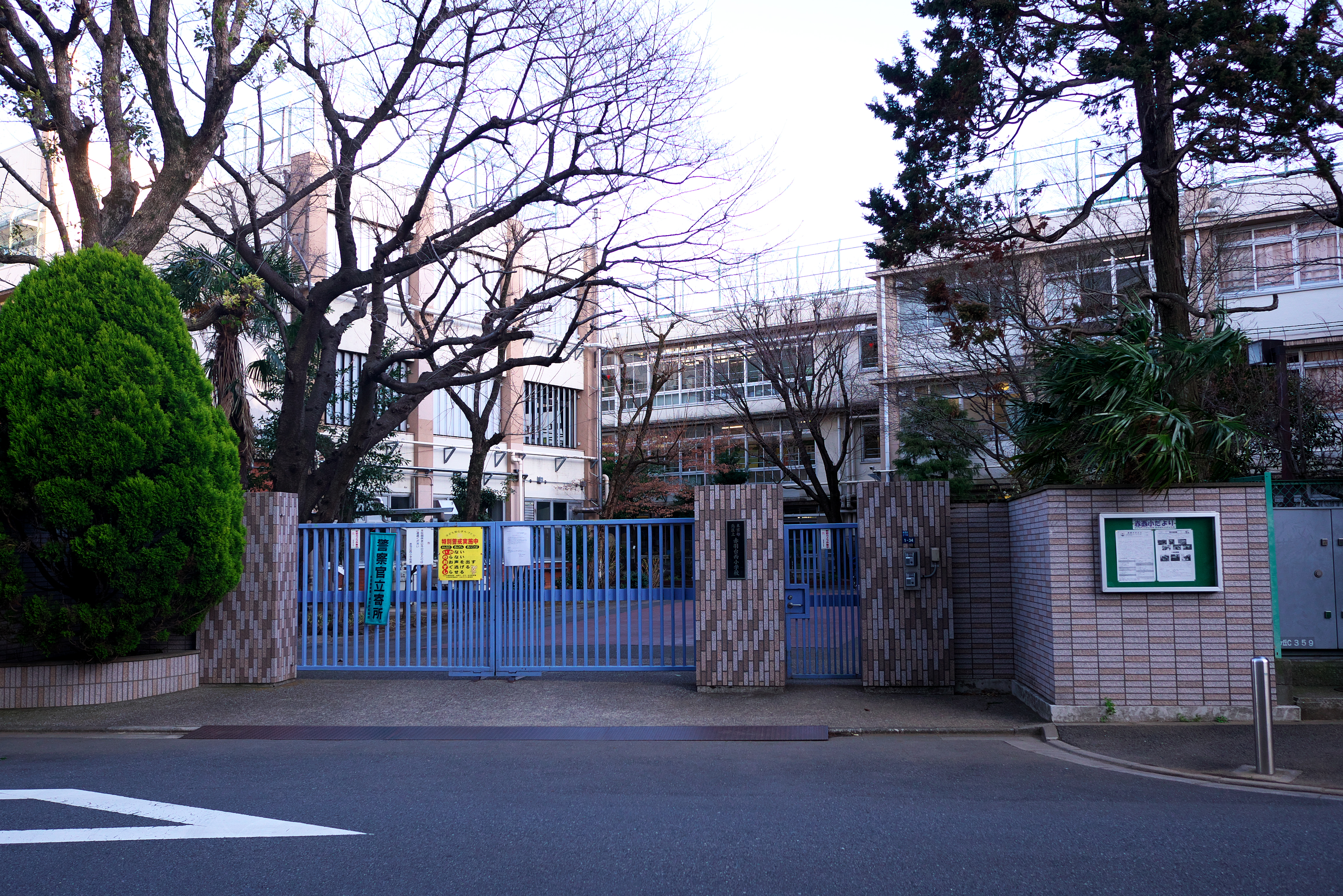 赤羽台西小学校正門の様子です。